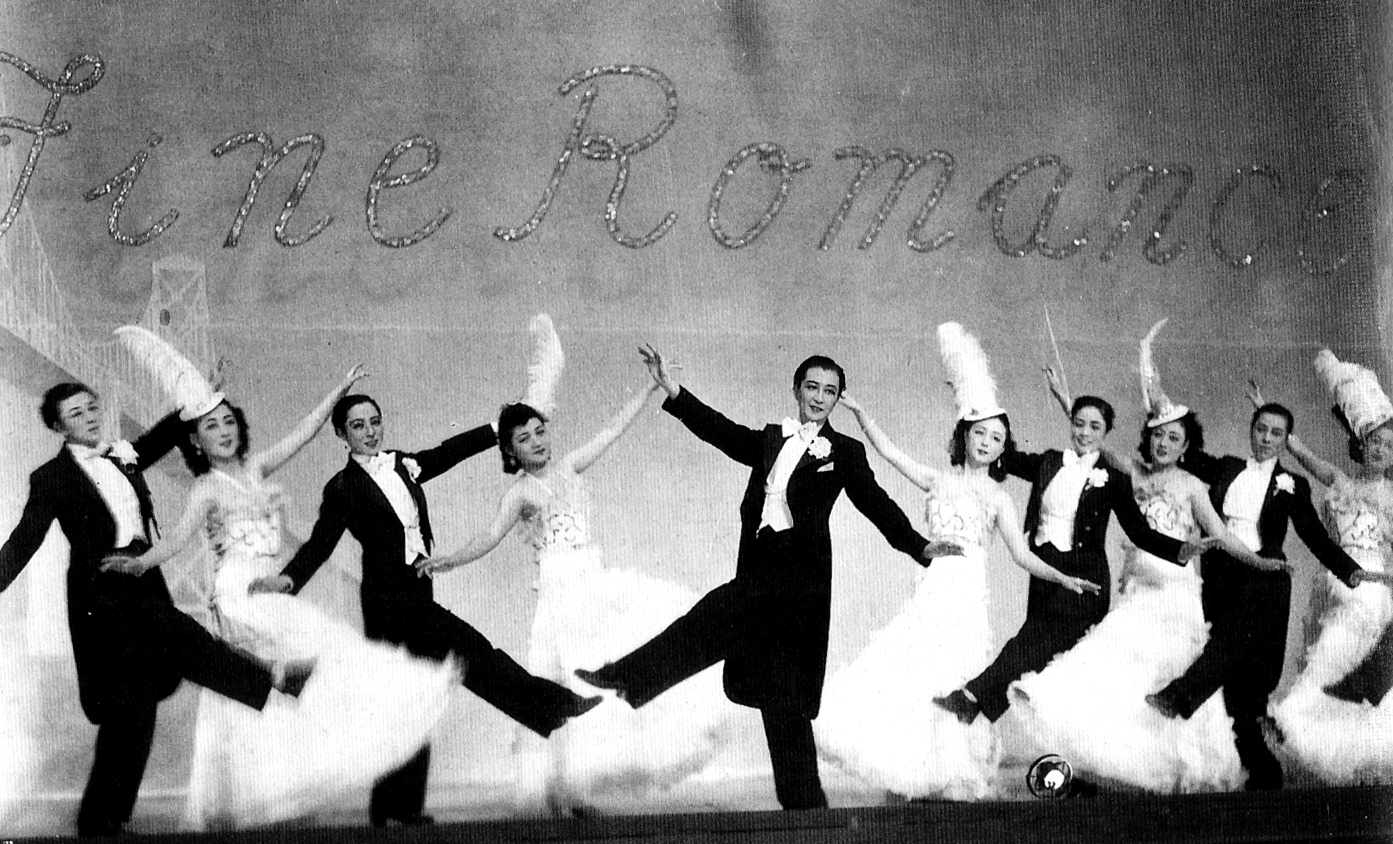 雪組「ファインロマンス」。中央：春日野八千代(Kasugano Yachiyo)、その右：乙羽信子(Otowa Nobuko)・故里明美(Furusato Akemi)・東郷晴子(Tougou Haruko)